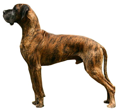 Dogue allemand sur fond blanc